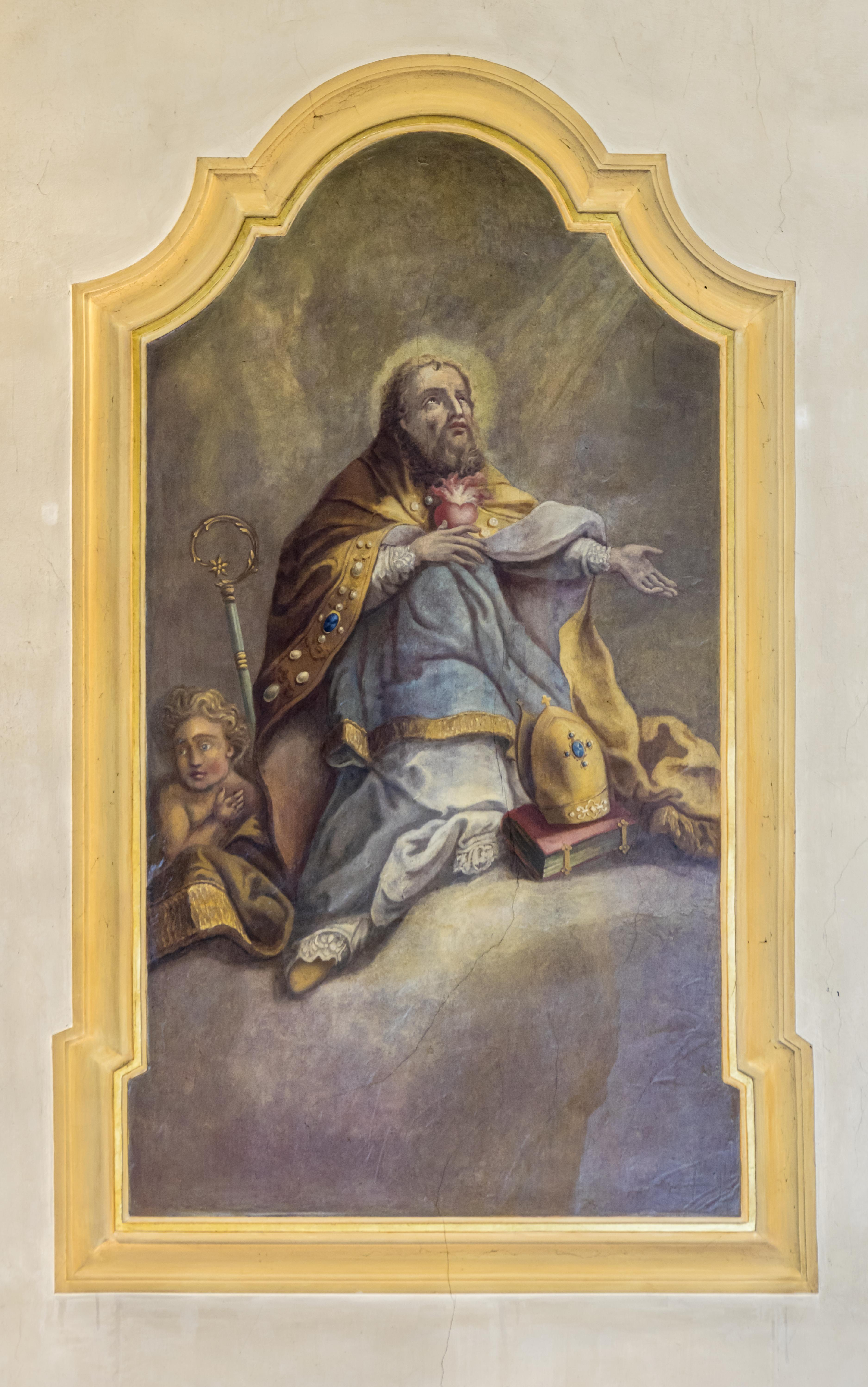 Bilder aus Wyhl am Kaiserstul hier die katholische Pfarrkirche St. Blasius Bild in der rechten Seite des Chores